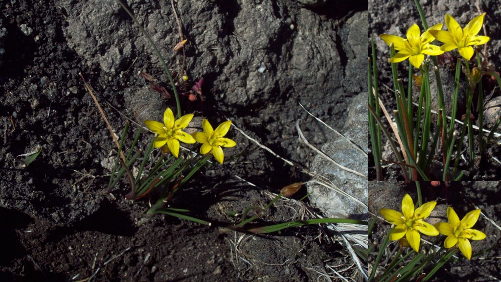 Nothoscordum montevidense. Amaryllidaceae. Fotos tomadas al margen de la Ruta 55 en suelo superficial entre rocas en Palmar, departamento de Soriano, Uruguay.